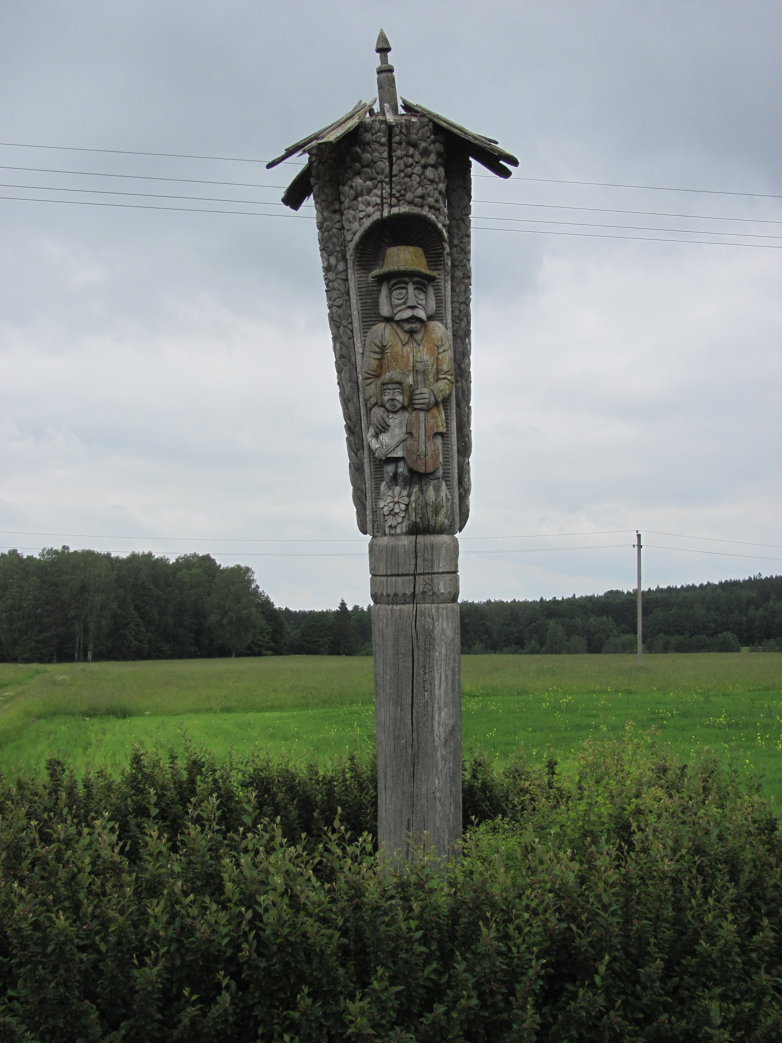 Rokėnai, Lithuania